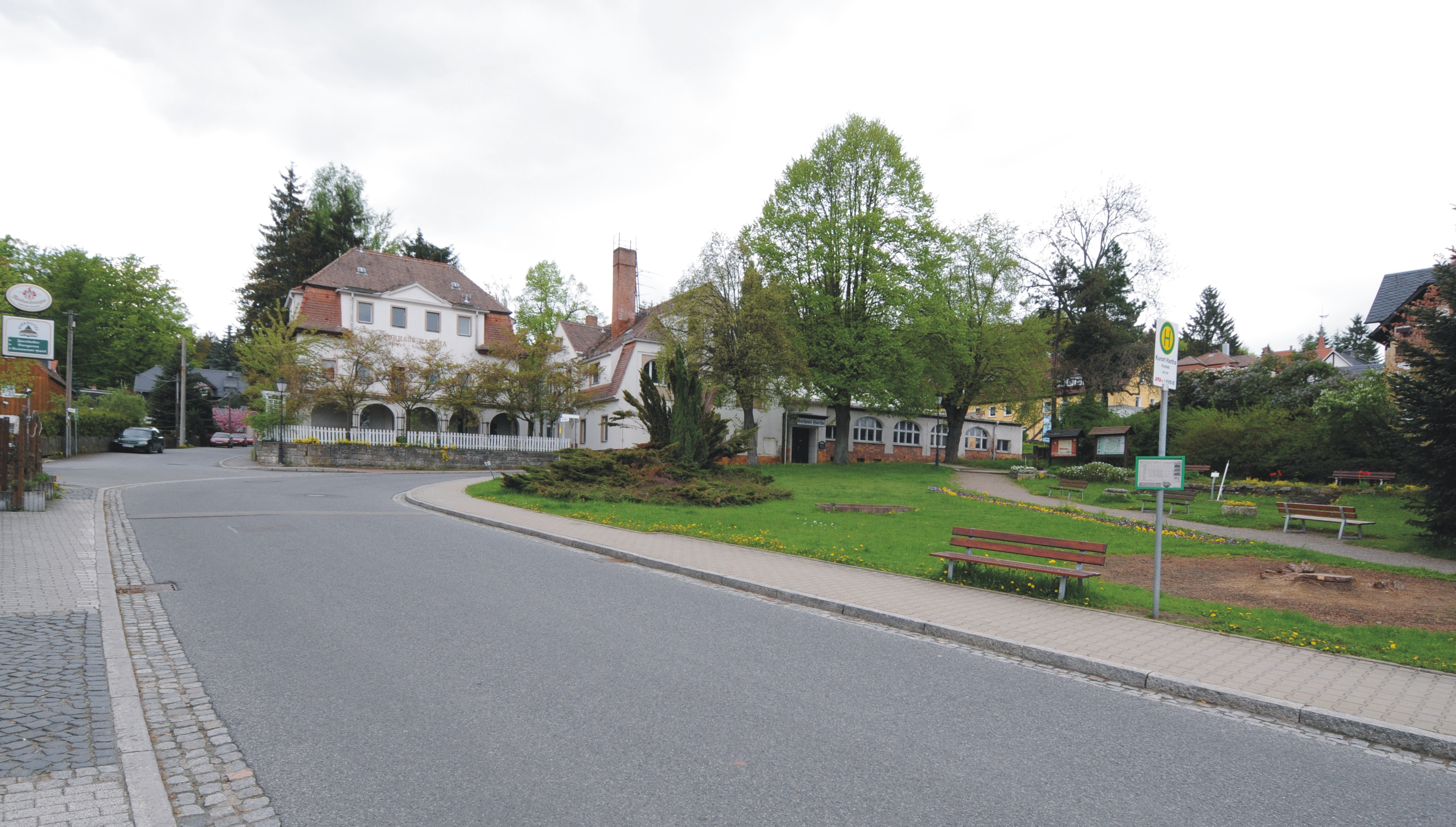 Kurort Hartha, Kurplatz (Sachsen, Deutschland)